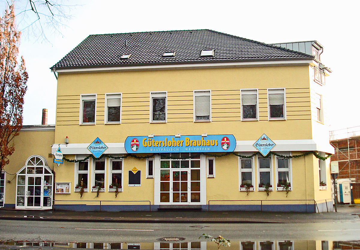 Gütersloher Brauhaus, ehemals kath. Vereinsheim, gegenüber der St.-Pankratius-Kirche